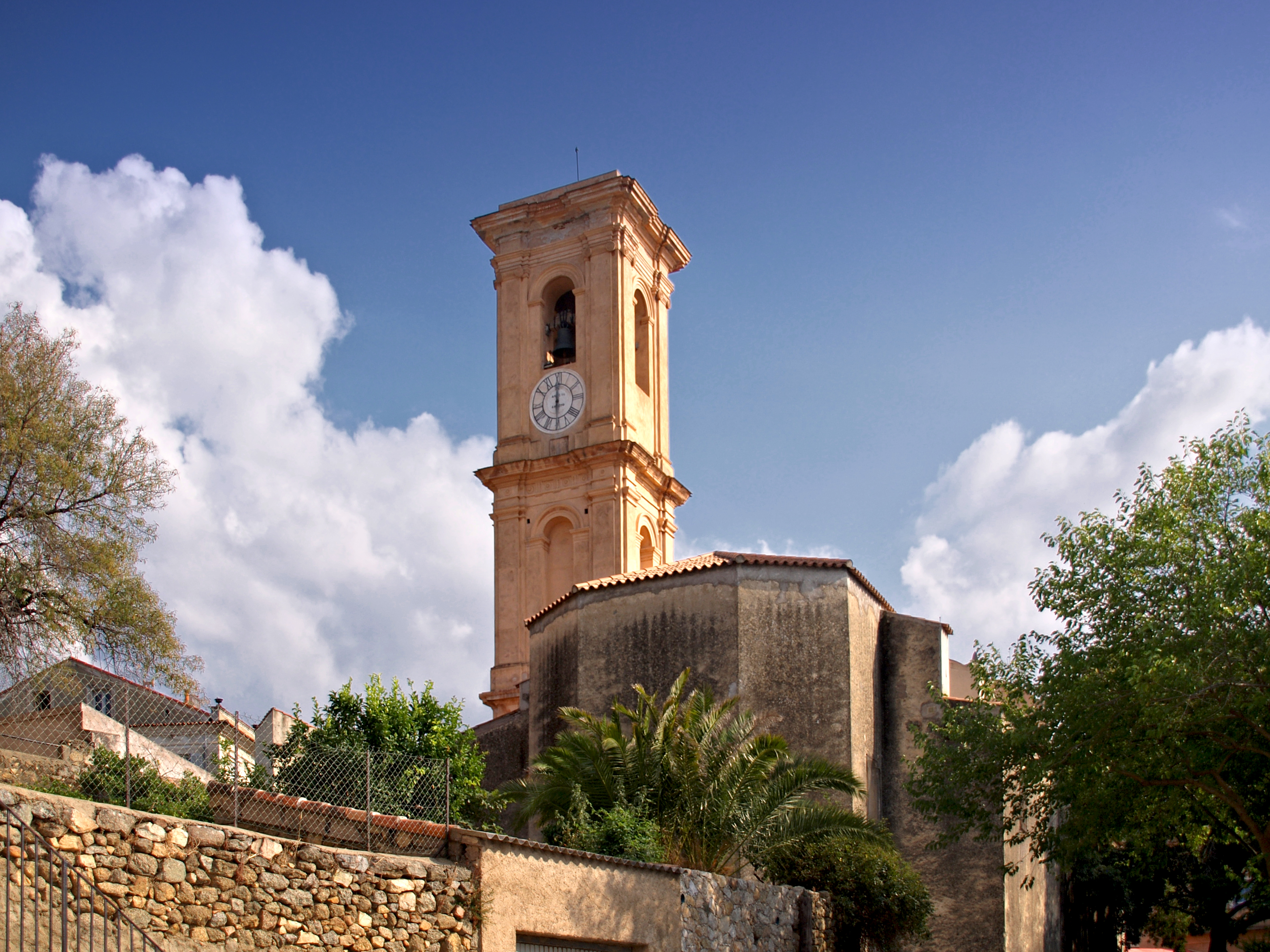 Aregno (Corsica) - Église paroissiale Saint-Antoine